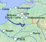 Kaart van de Somme op basis van Wikimedia Commons kaart van Frankrijk